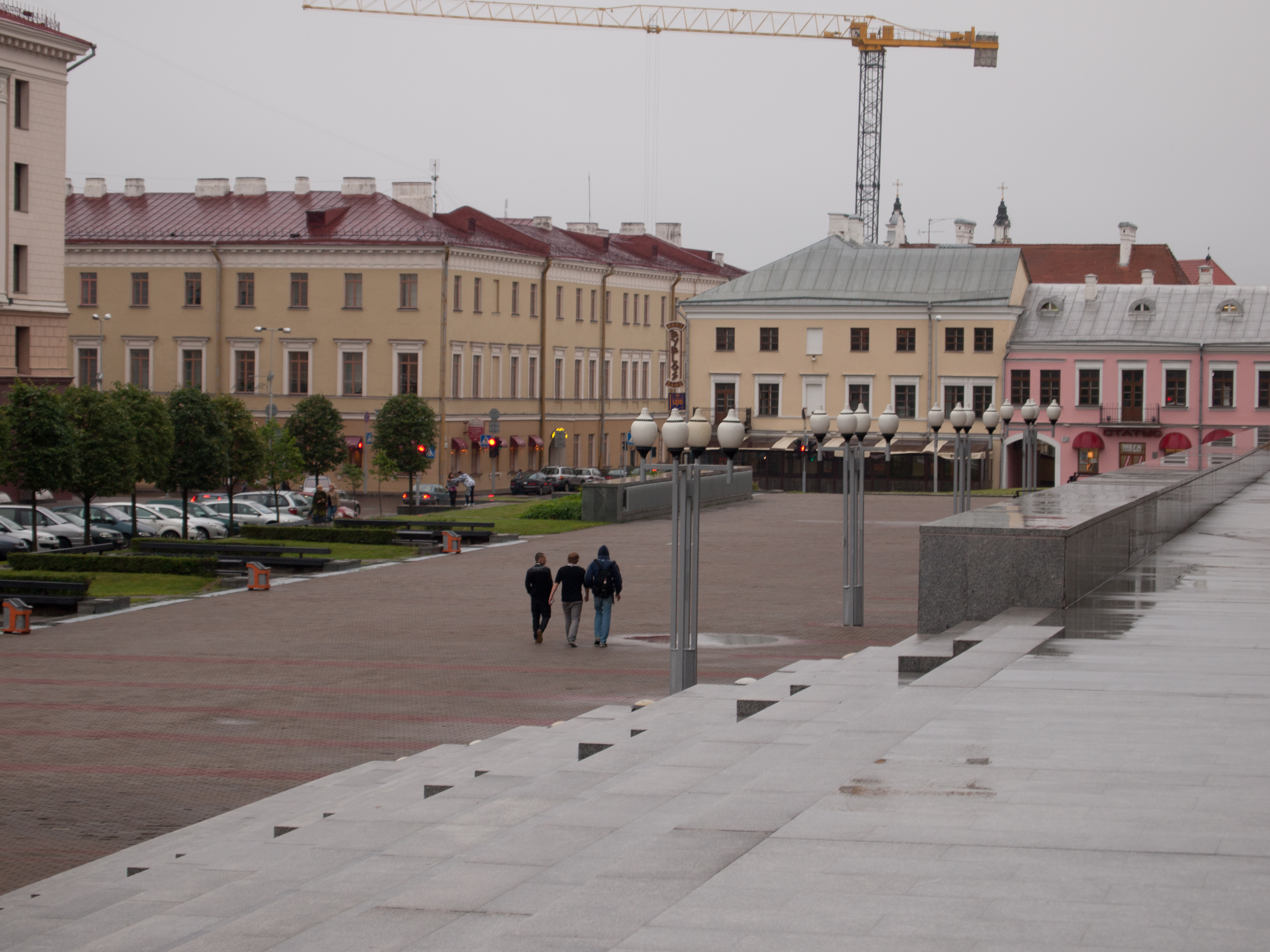 Engelsstraße